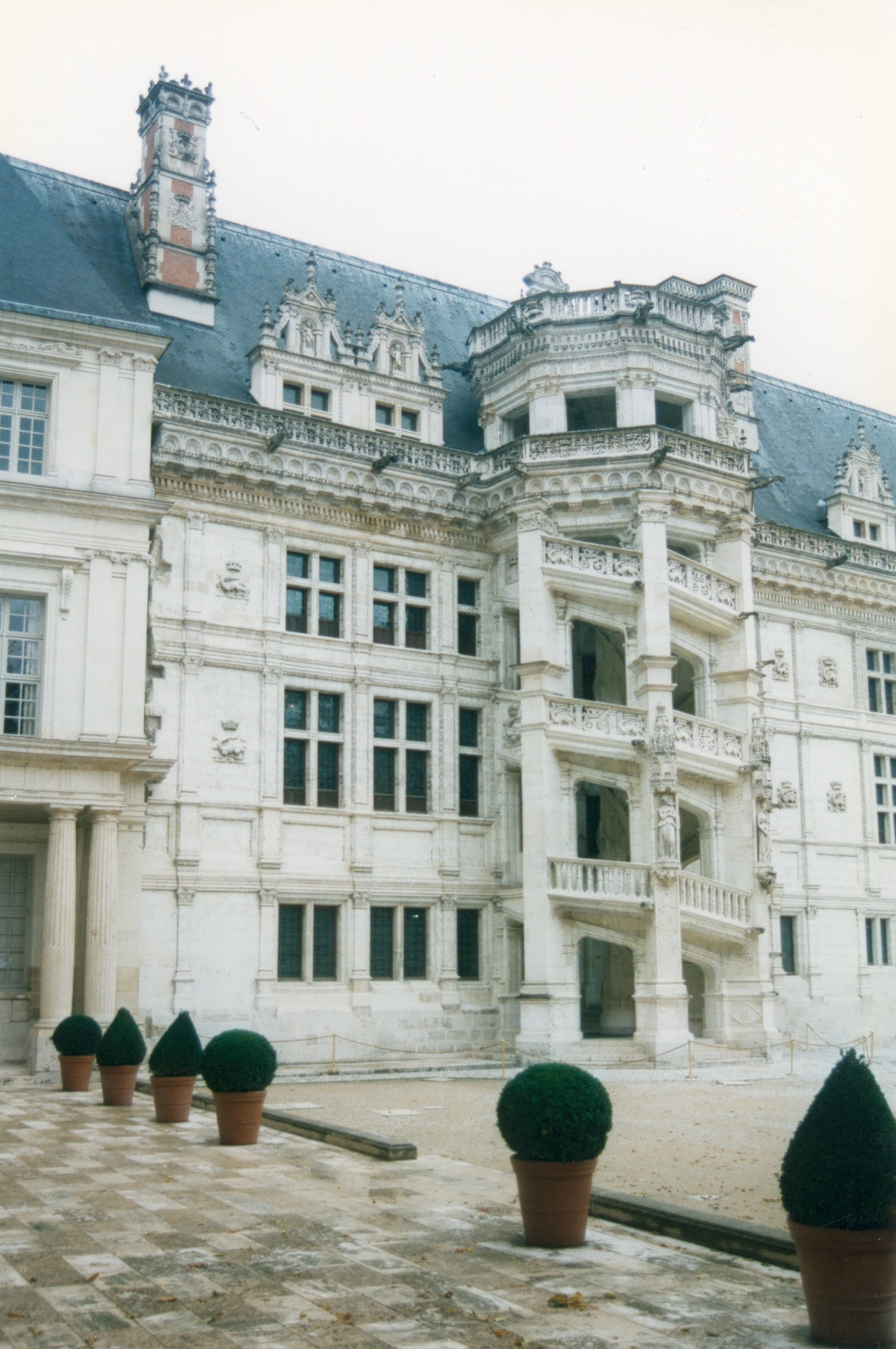 France Loir-et-Cher Blois Château Photographie prise par GIRAUD Patrick